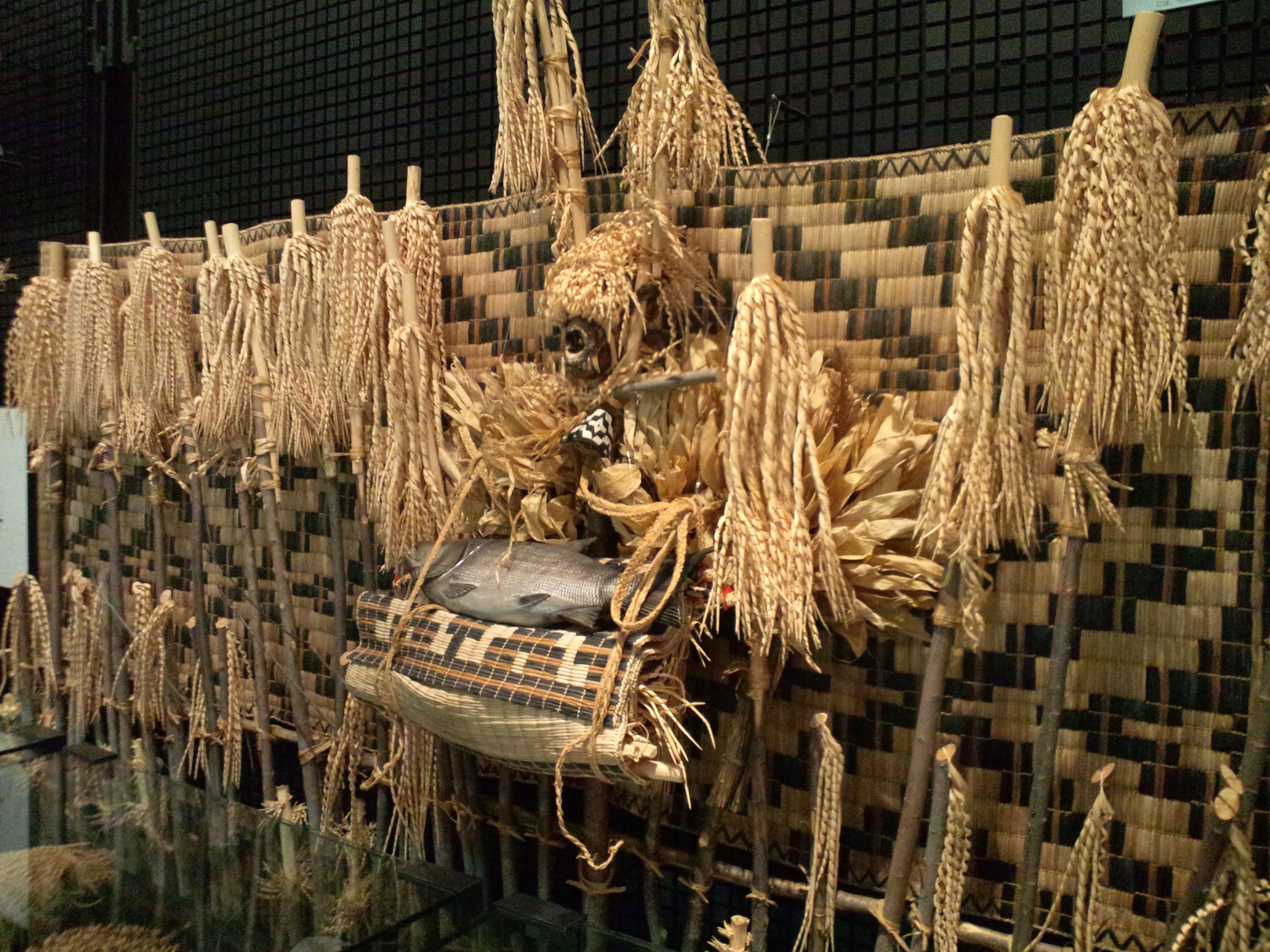 国立民族学博物館（大阪） アイヌの祭壇＜ヌササン＞（北海道、二風谷）